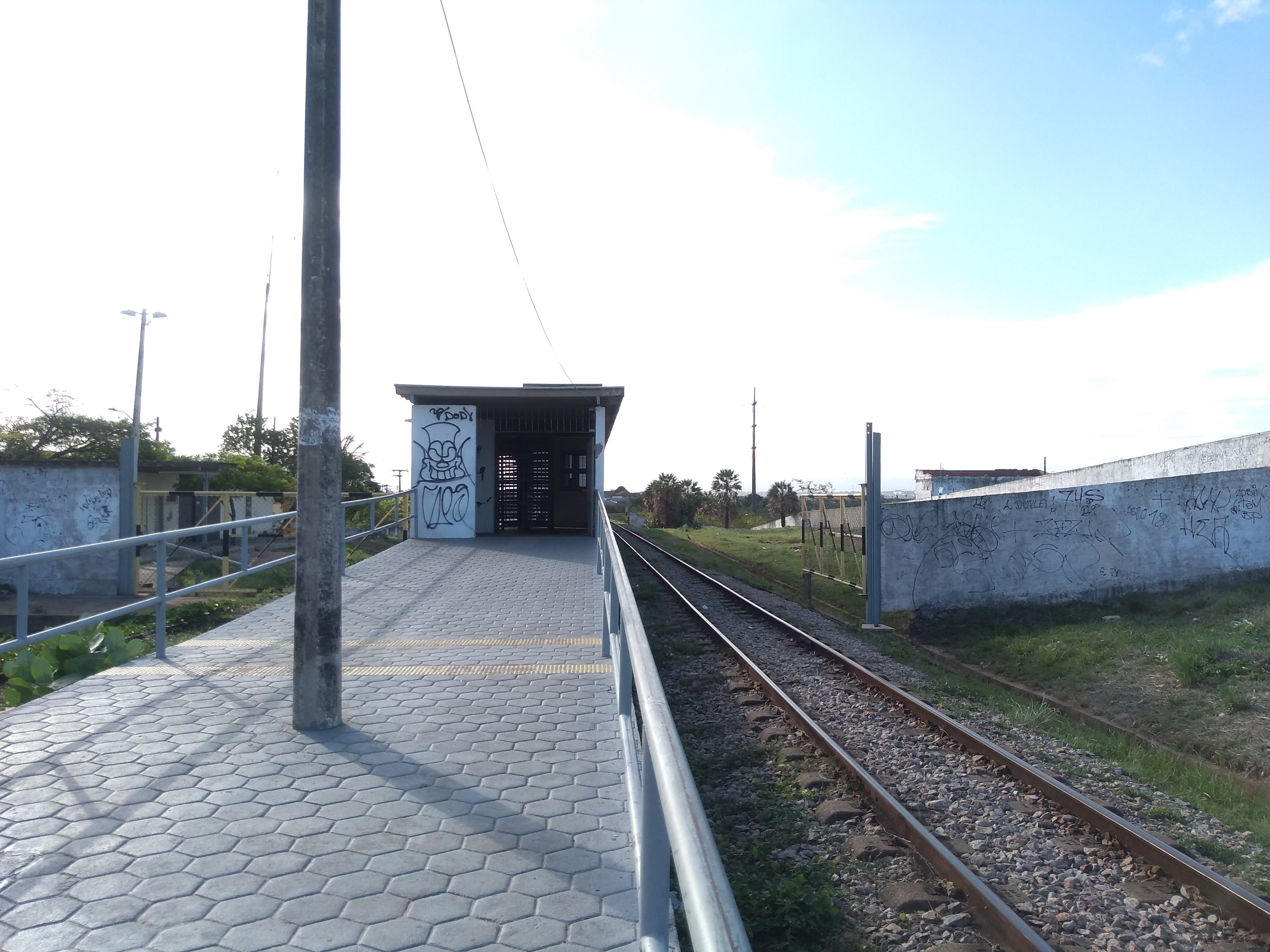 Acesso da Estação Araturi, na cidade de Caucaia, da Linha Oeste.